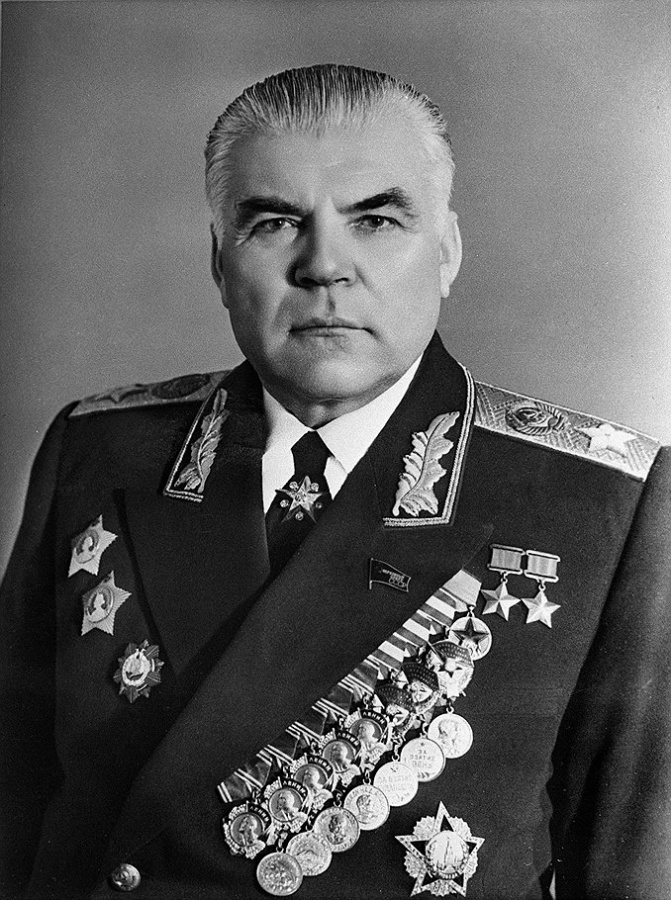 Родион Яковлевич Малиновский (1898 — 1967) — советский военачальник и государственный деятель